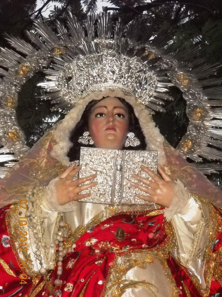 Virgen de la Encarnación, titular de gloria de la hermandad, que procesiona en octubre